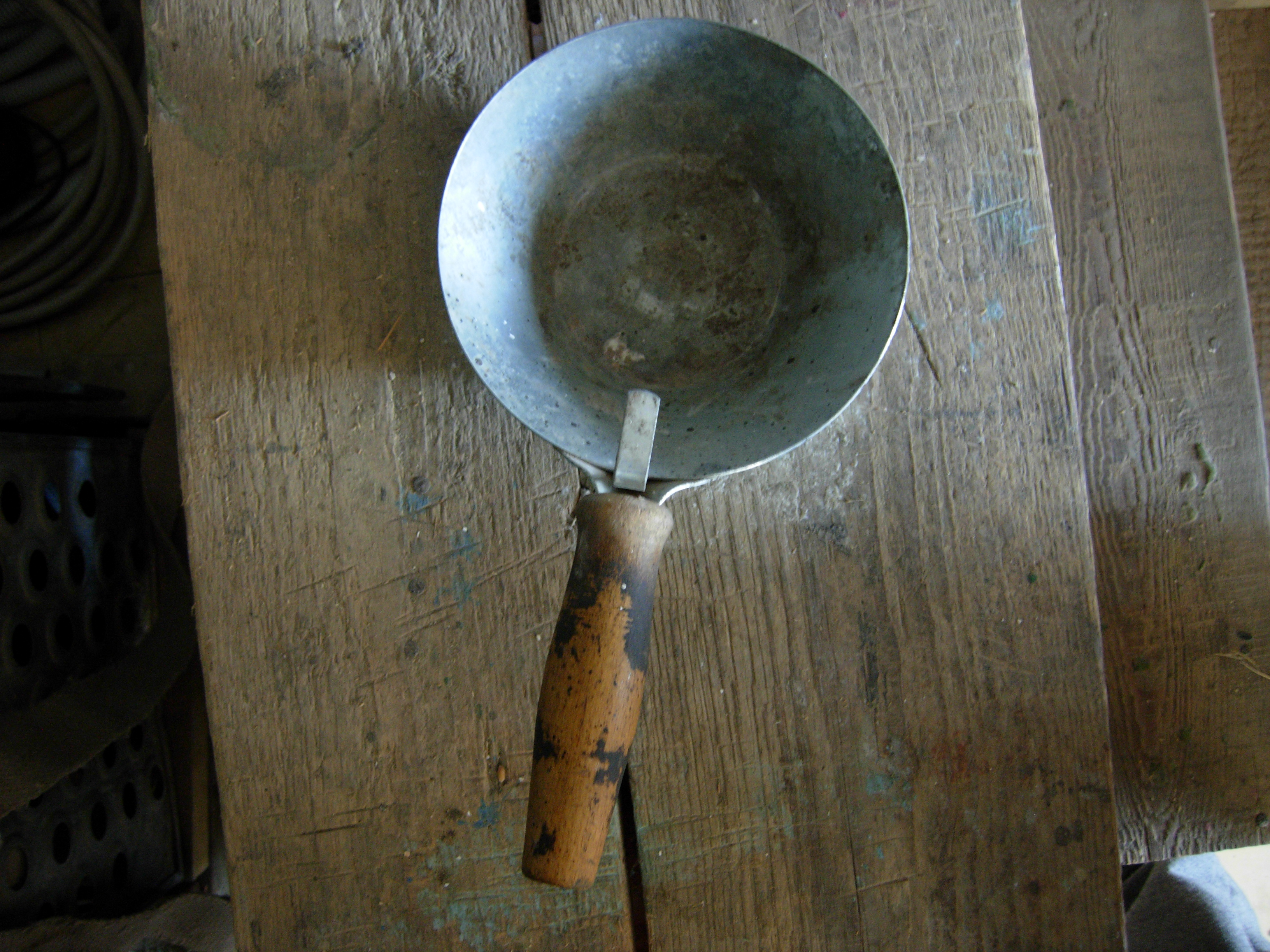 Fanka - pohled seshora